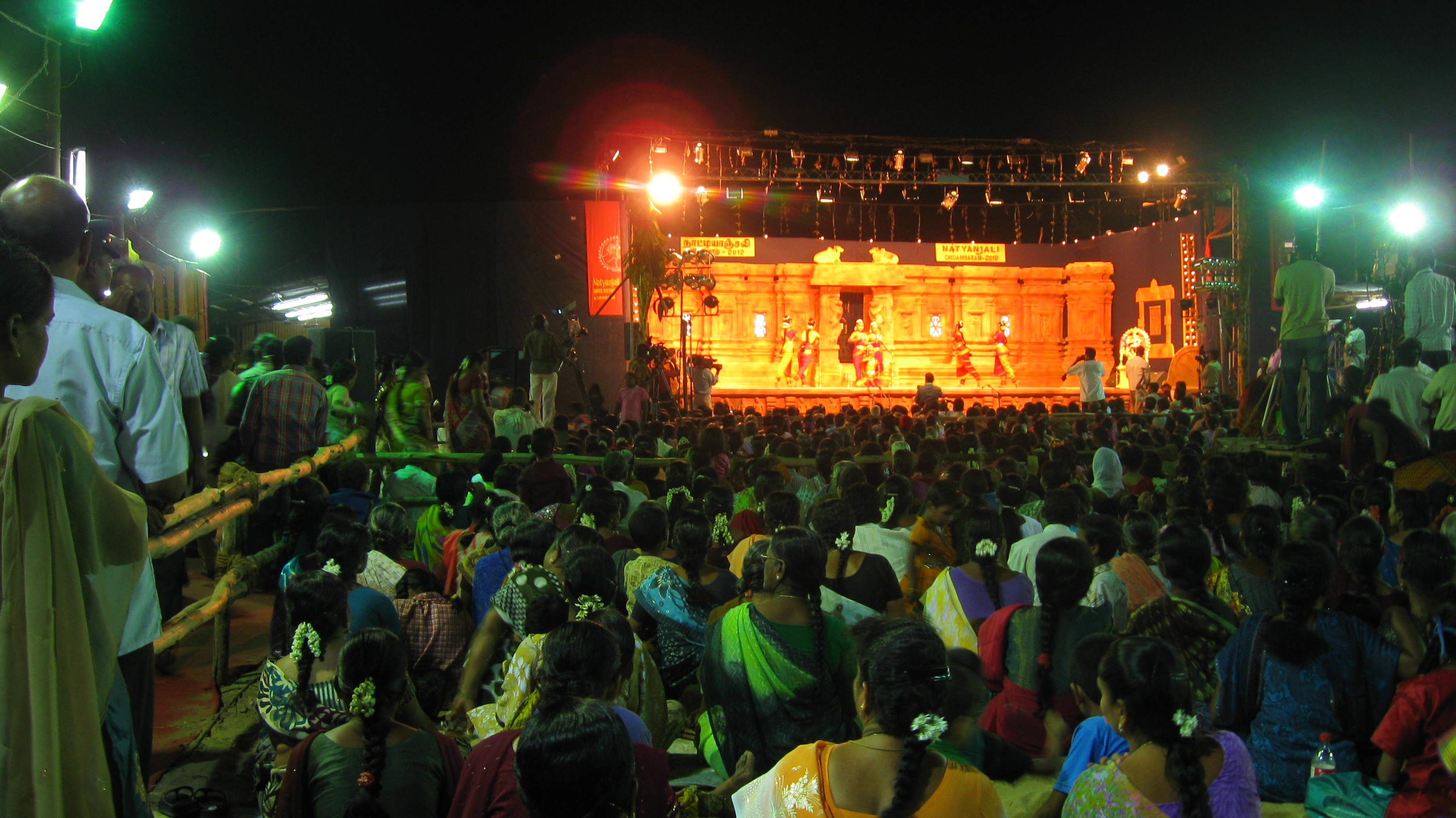 சிதம்பரத்தில் நடைபெறும் நாட்டியாஞ்சலி விழாக்காட்சி.